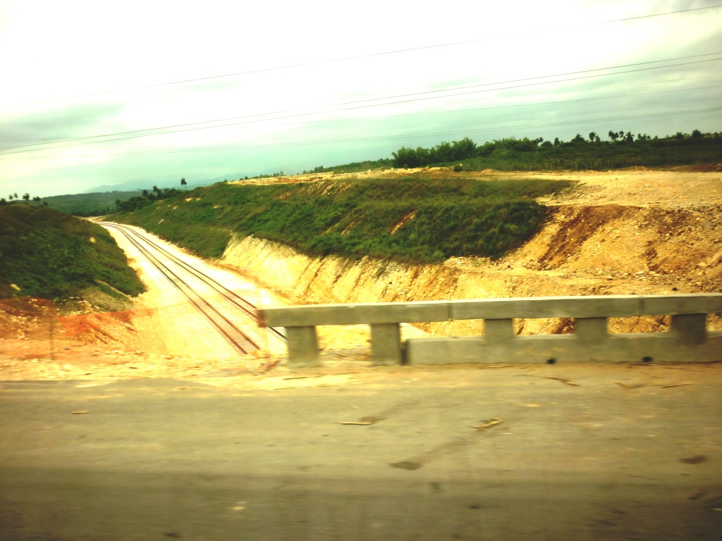 Paso del Ferrocarril Habana-Mariel bajo la Autopista A4 de Pinar del Río. Guanajay, Cuba